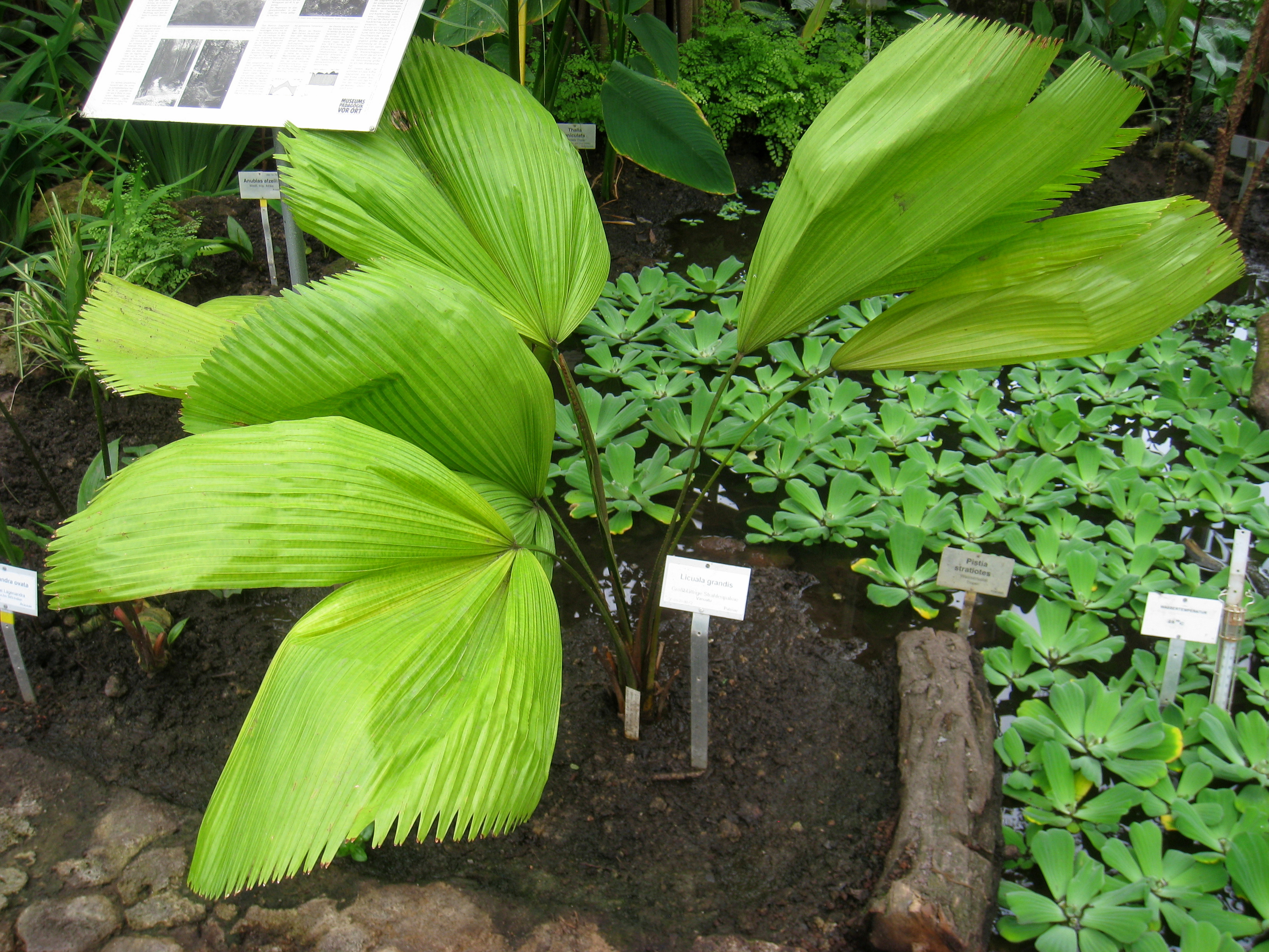 Licuala grandis specimen in the Botanischer Garten, Berlin-Dahlem (Berlin Botanical Garden), Berlin, Germany.